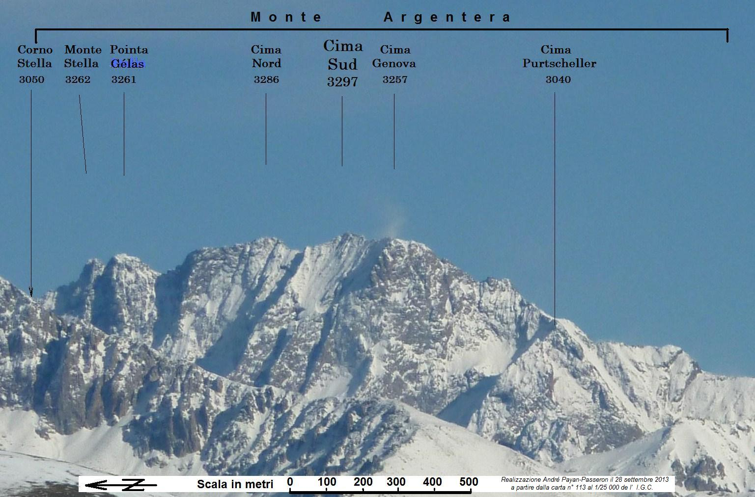 Monte Argentera visto del S.O. a 30 km della cima della Dreccia (2011 m) - Stazione de Valberg (06 - Alpes-Maritimes) FRANCIA.